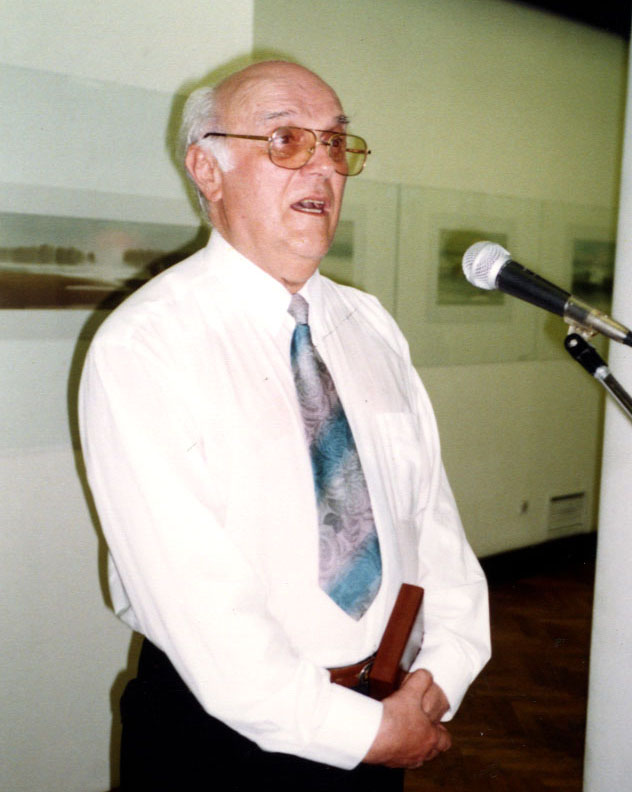 Akademski slikar Đorđe Petrović na otvaranju izložbe u pavoljonu Cvijeta Zuzorić u Beogradu 2002. godine